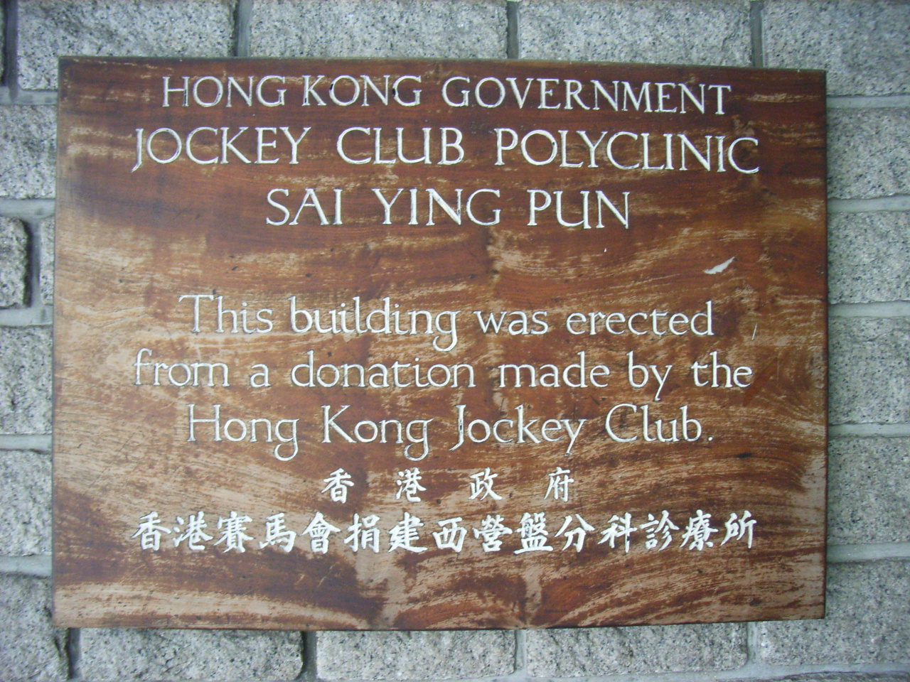 西營盤醫院，位於zh:皇后大道西130號，現稱zh:西營盤分科診所，